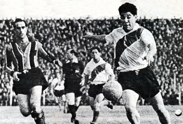 Enrique Omar Sívori en un partido ante Almagro. Circa 1955